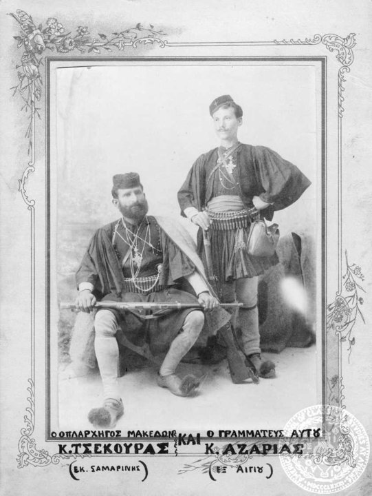 К. Цекурас от Самарина и секретарят му К. Азариас от Егио.